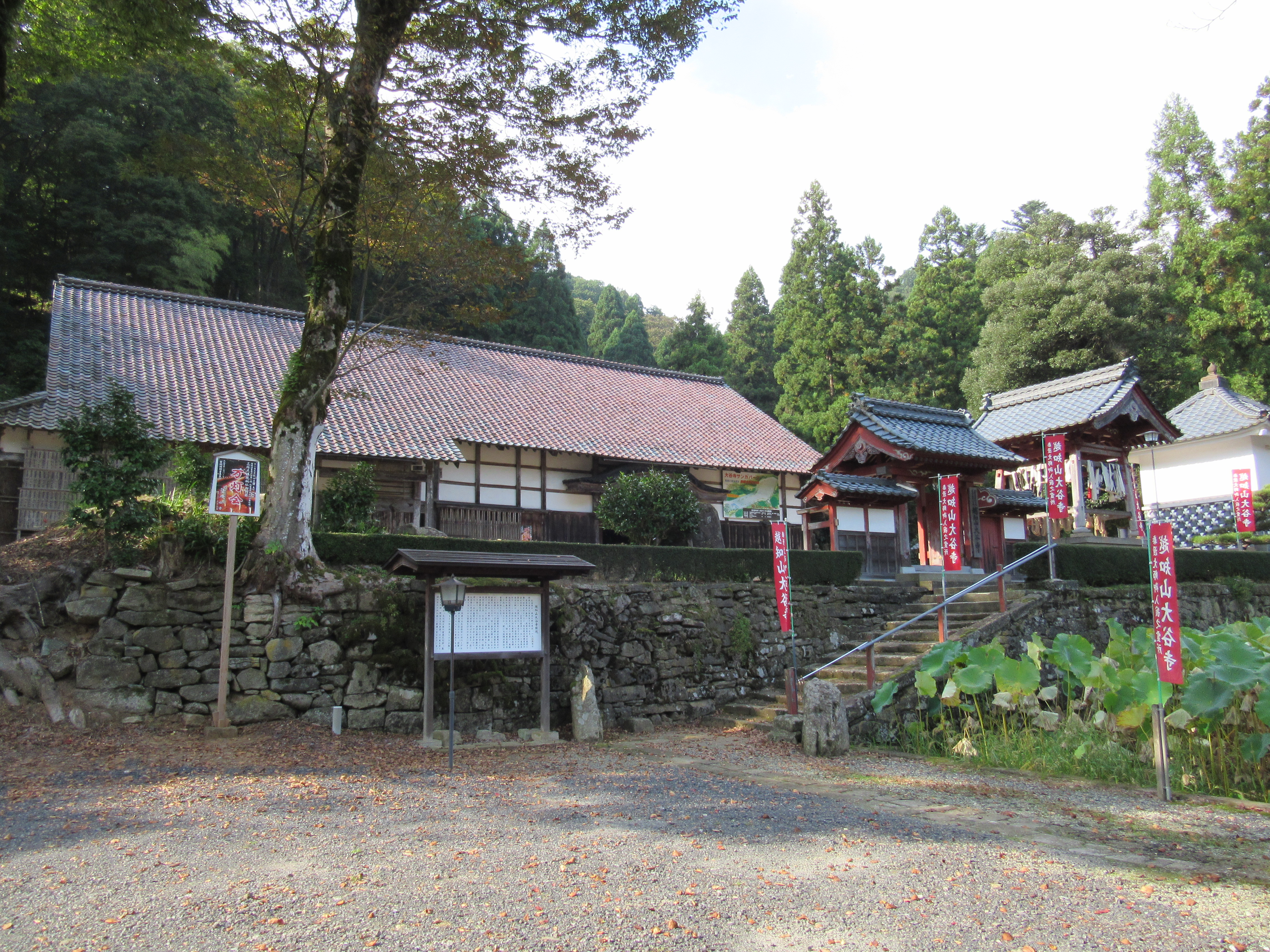 大谷寺 (福井県越前町)